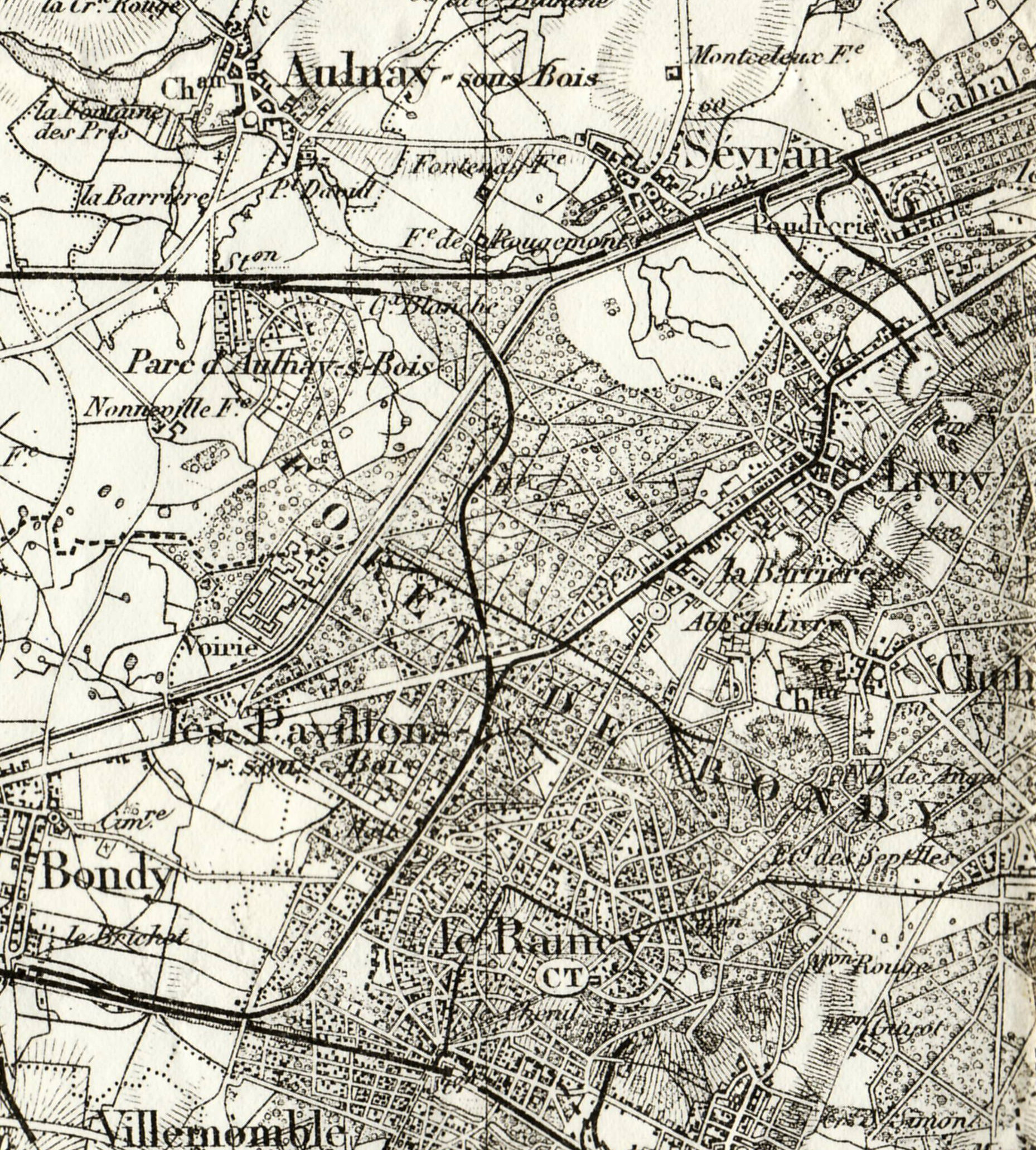 Carte d'État-major "Paris SE" gravée en 1888 Extrait centré sur la Ligne des Coquetiers (actuelle Ligne 4 du tramway parisien actuelle dans la Seine-Saint-Denis) : Bondy, Les Pavillons-sous-Bois, Aulnay-sous-Bois, Livry-GarganLivry-Gargan Le Raincy On y distingue également le tramway de Gargan à Livry et la voie Schaecher, ainsi qu'une bonne part du Tramway du Raincy à Montfermeil Echelle native 1/80.000e - Scanné à 600 dpi